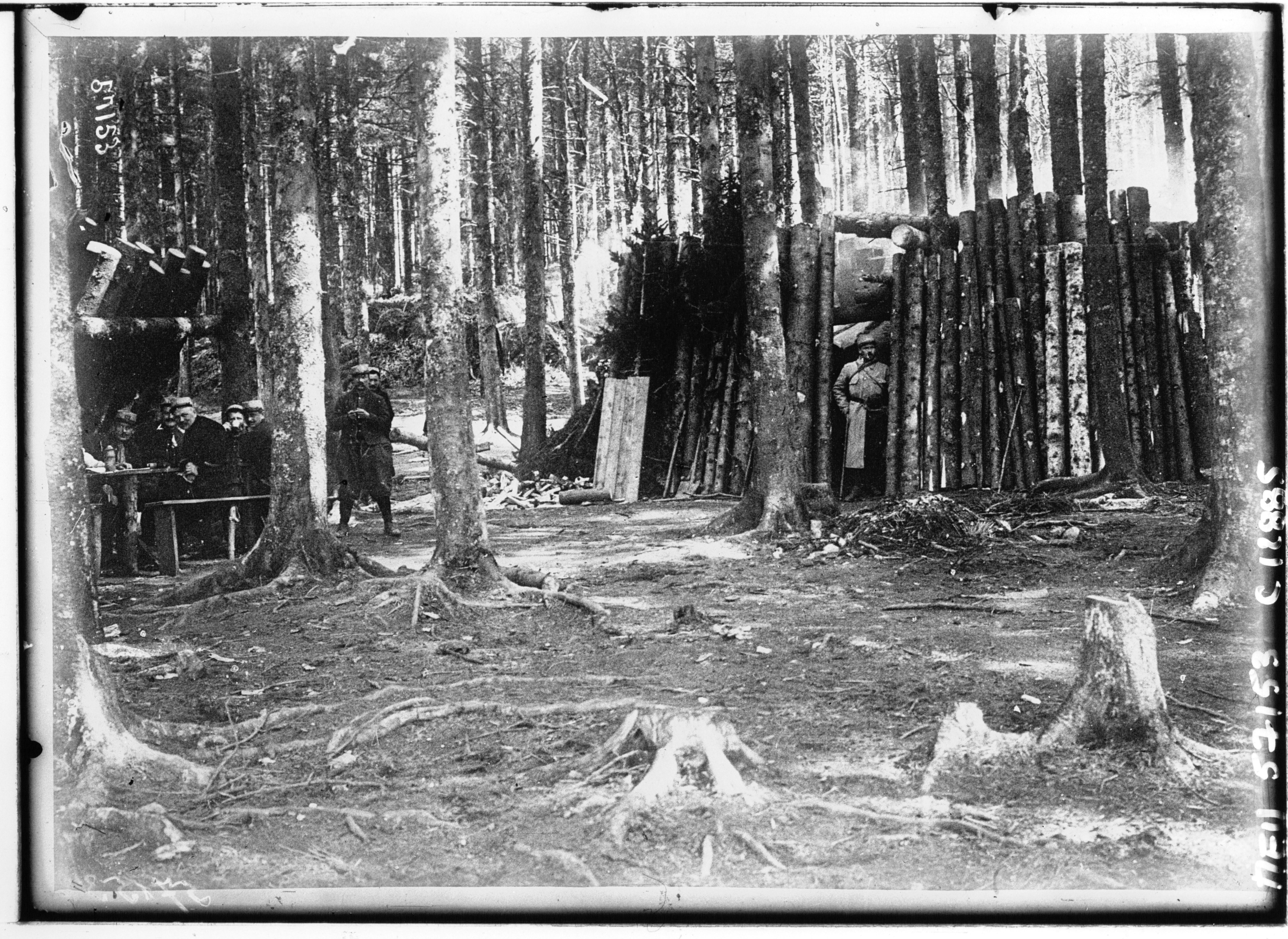 Nos fantassins dans leurs gourbis sur la terre d'Alsace (col du Bonhomme). Bibliothèque nationale et universitaire de Strasbourg